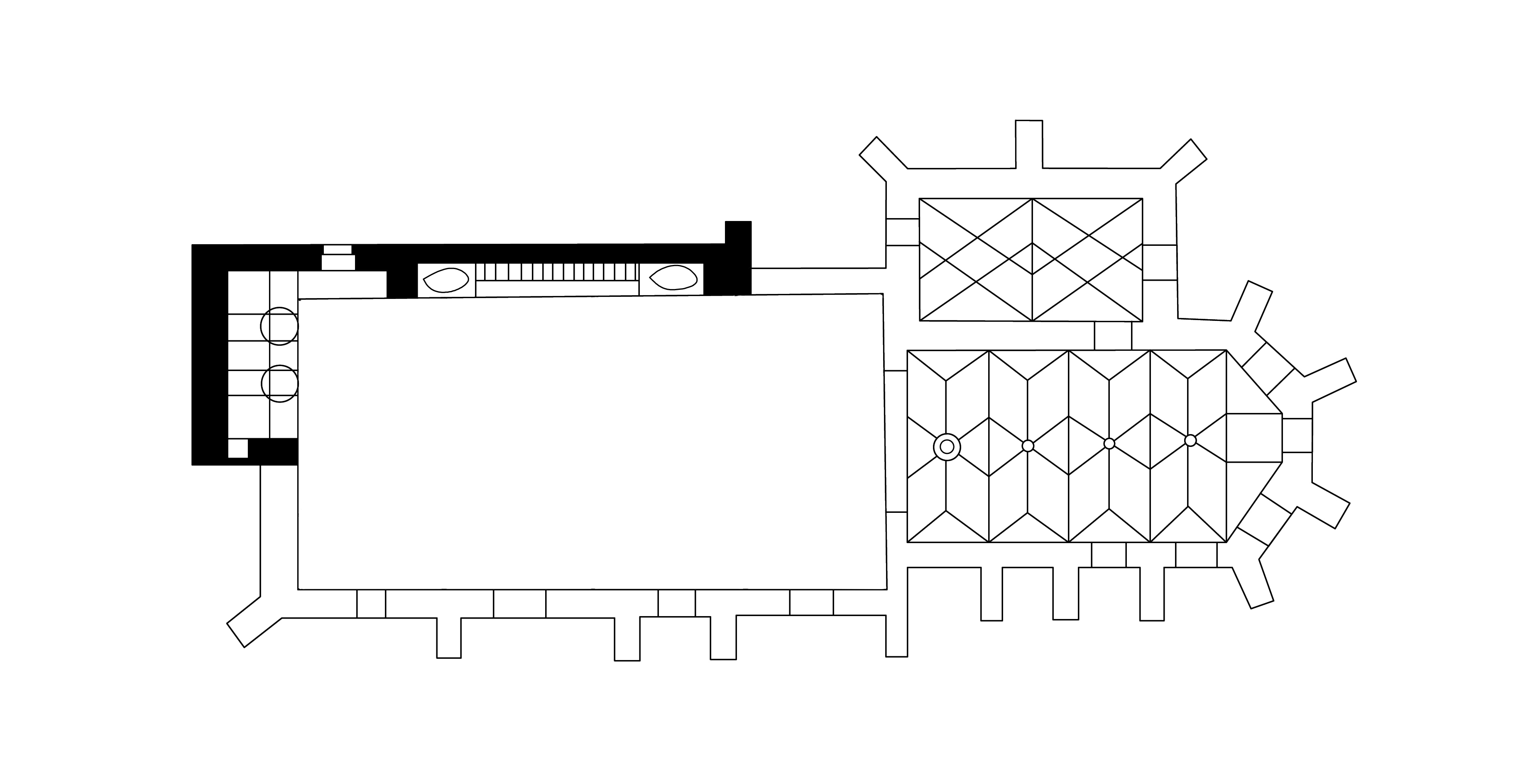 pôdorys kostola sv. Jiljí (Milevsko)